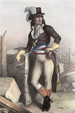 Jean-Marie Collot d'Herbois (1749-1798)